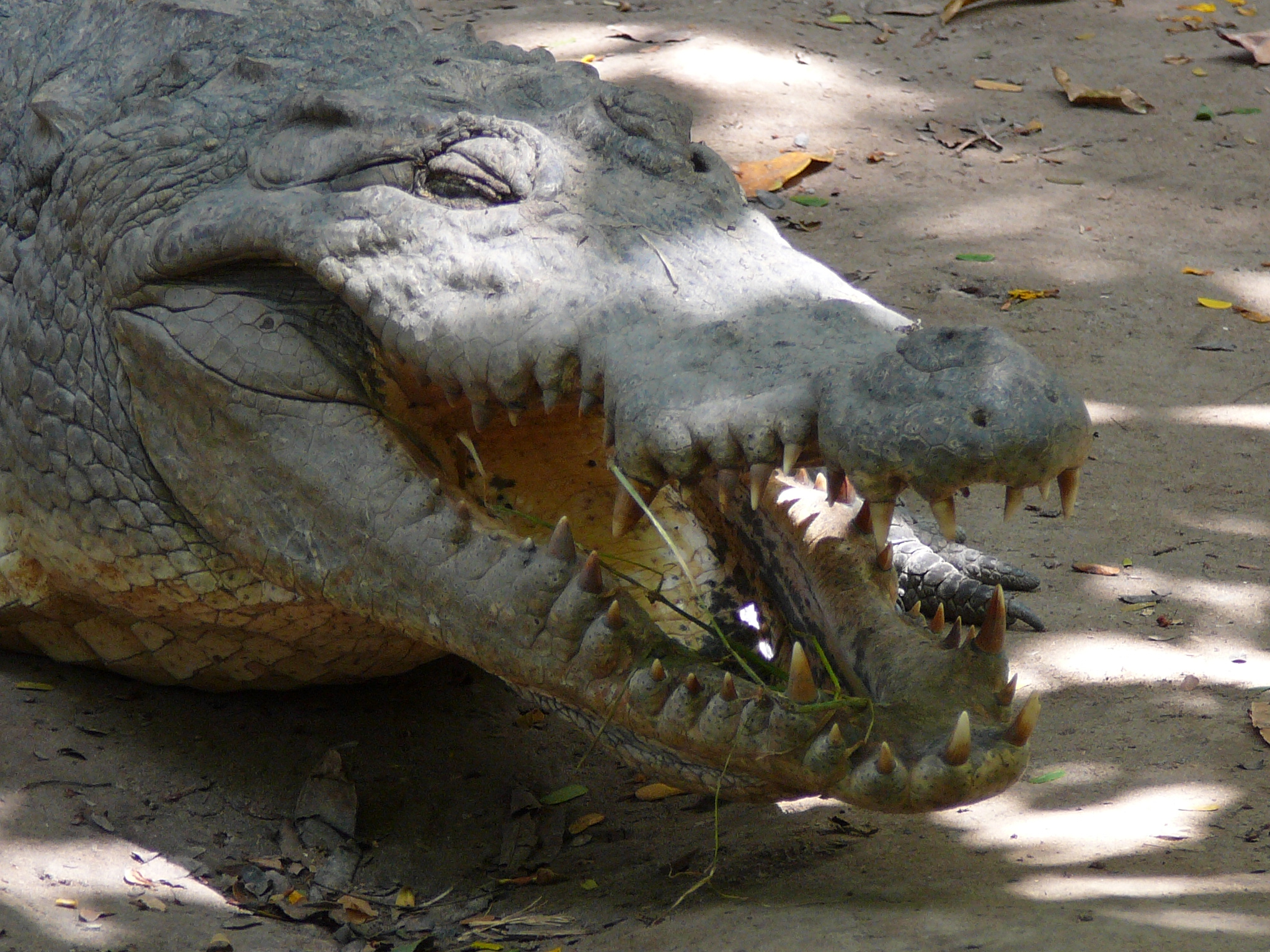 Crocodylus niloticus